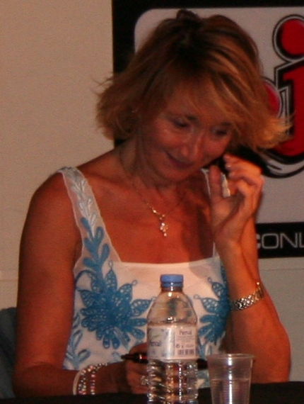 Séance de dédicaces avec l'équipe des Bronzés organisée par la Fnac des Halles.